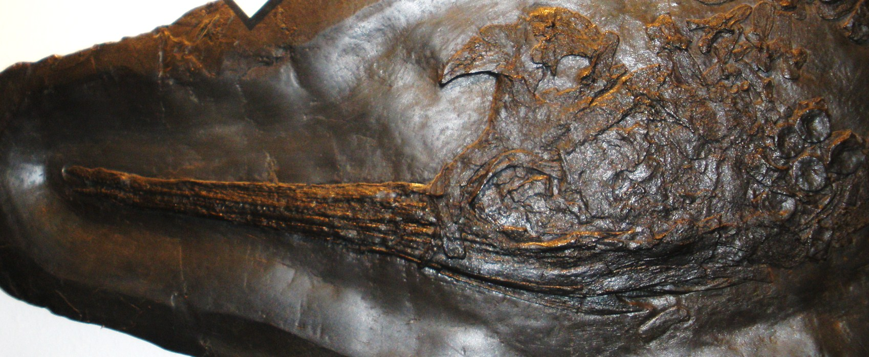 Fossil of Besanosaurus, an extinct reptile. - Took the photo at Museo dei Fossili di Besano